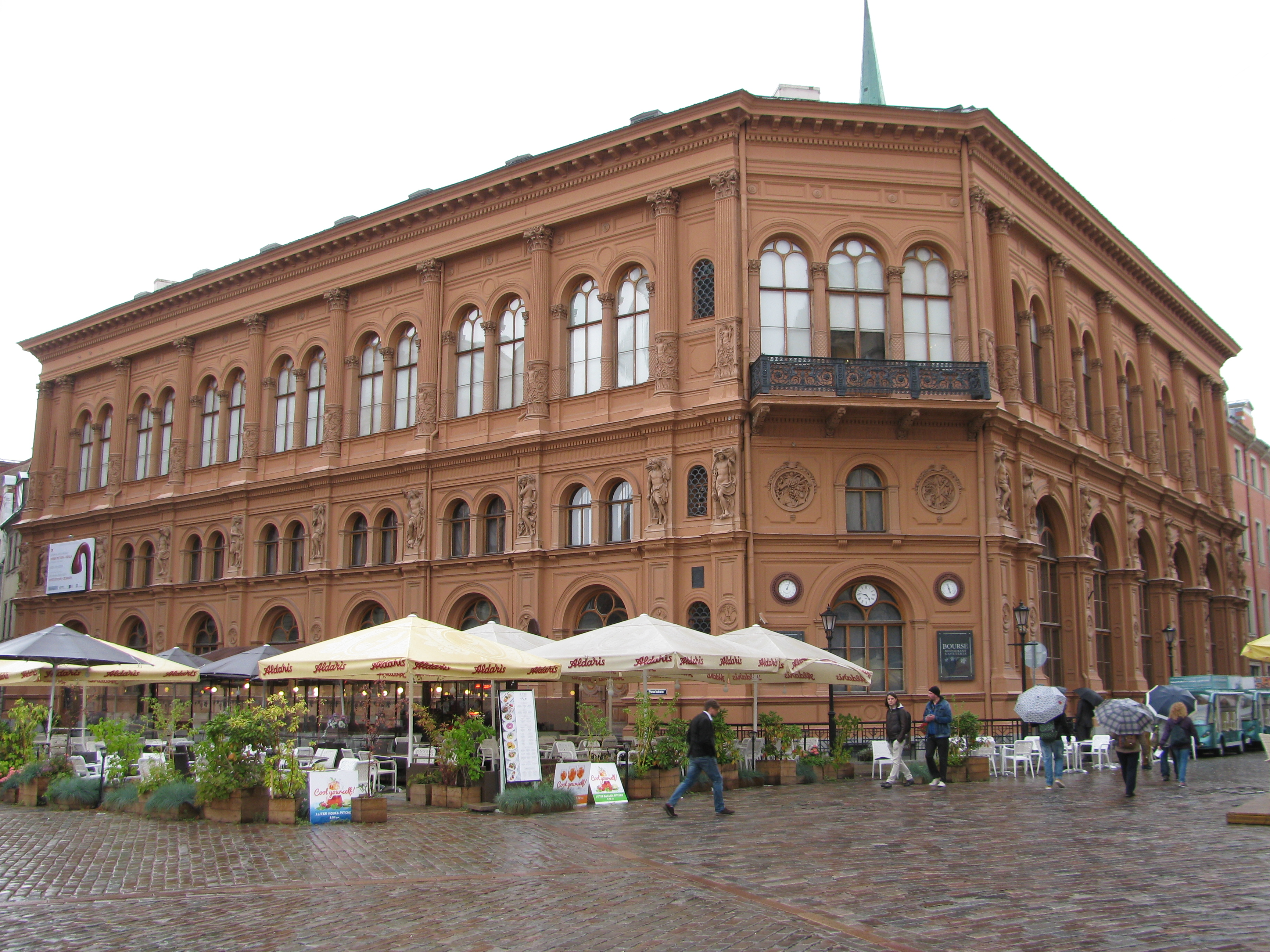 Birža, Rīga, Pils iela 24; Doma laukums 6; Jēkaba iela 1